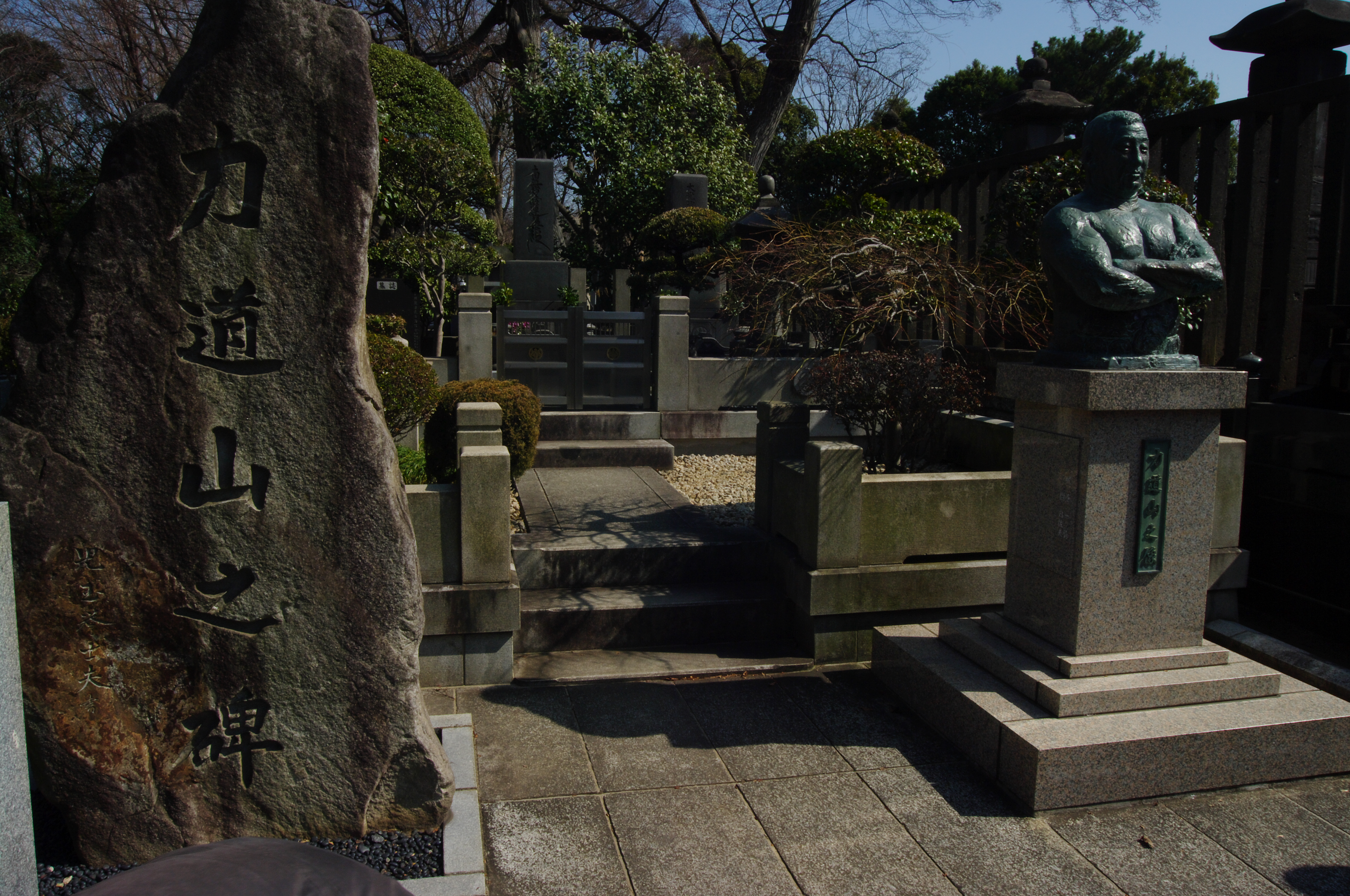 力道山